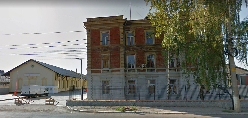 Abator Corp Vechi